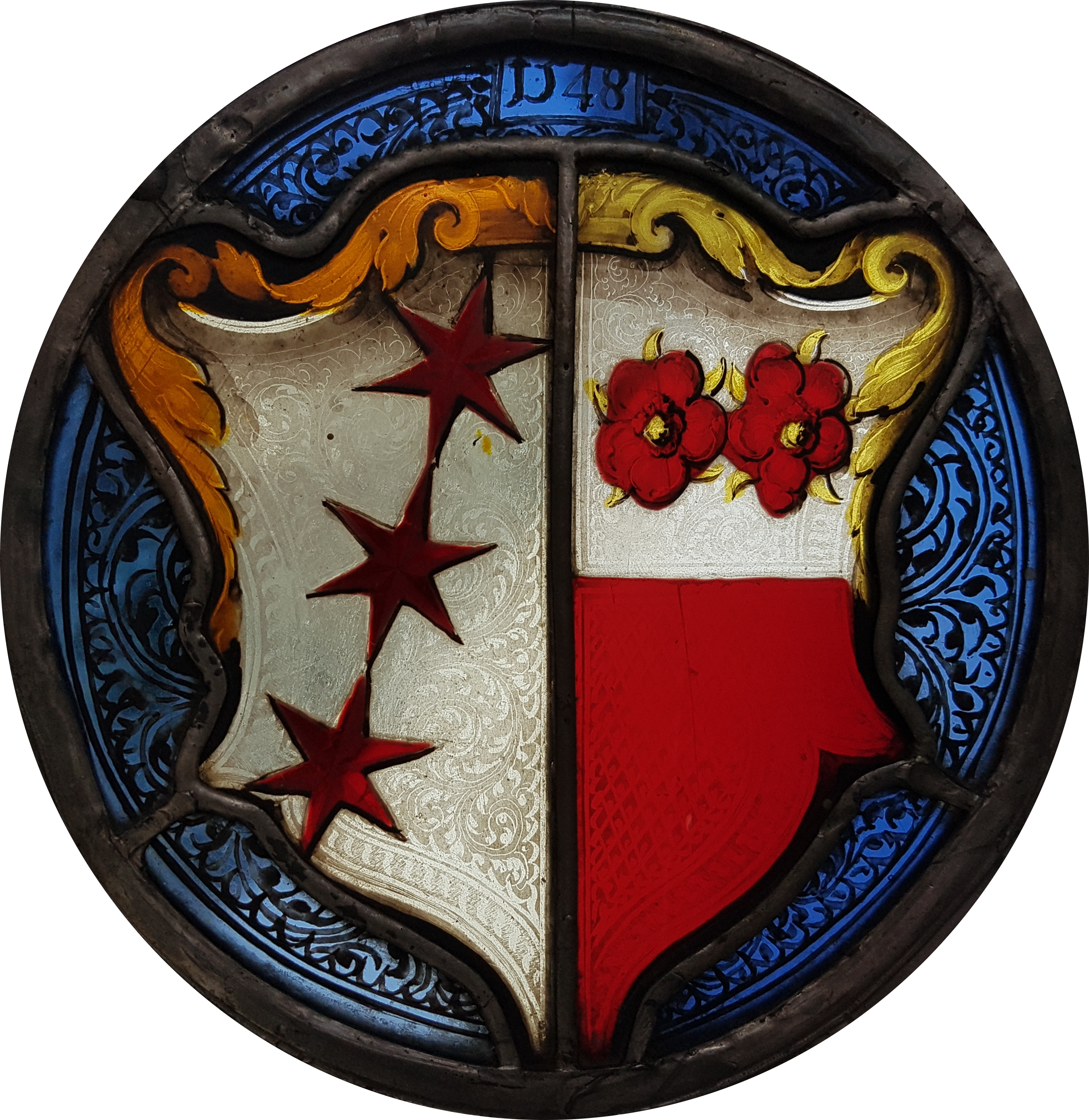 Rundscheibe mit Allianzwappen Urban von Muhleren und Verena Schwend.